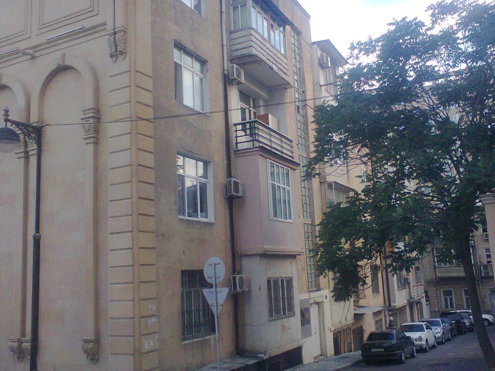 Дом в котором жил Ашраф Искендер оглы Гусейнов